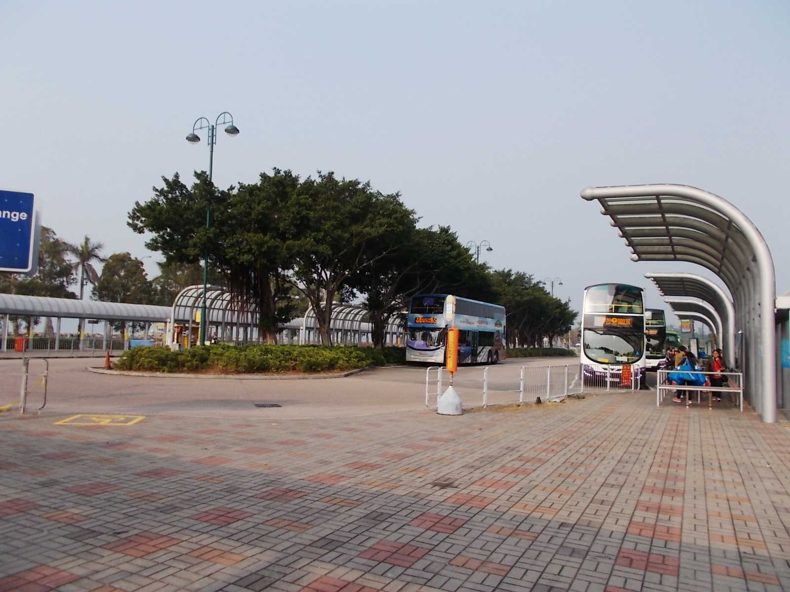 欣澳站公共運輸交匯處(2019年)